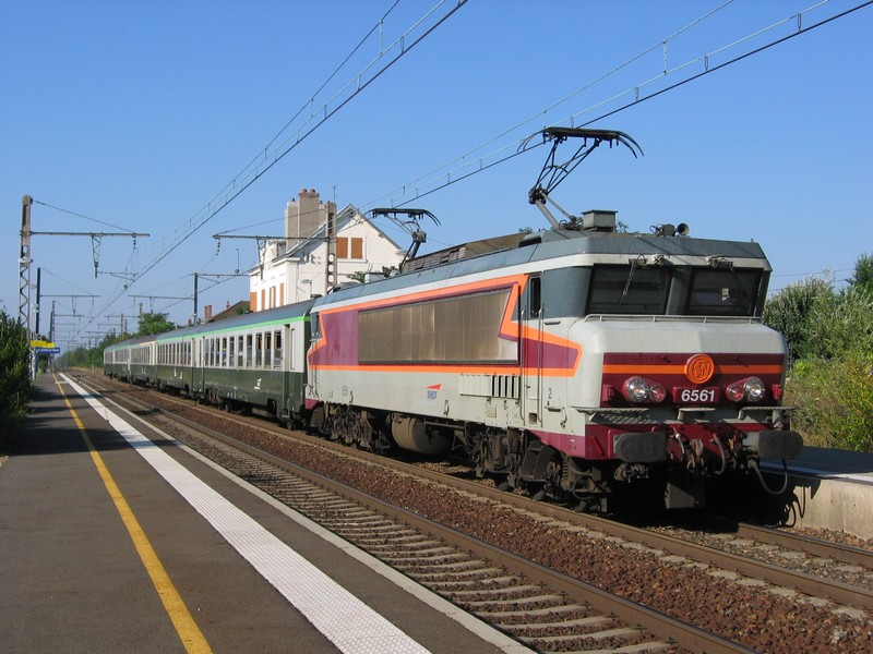 CC 63561 sur un TER Mâcon-Avignon à Saint-Georges-de-Reneins